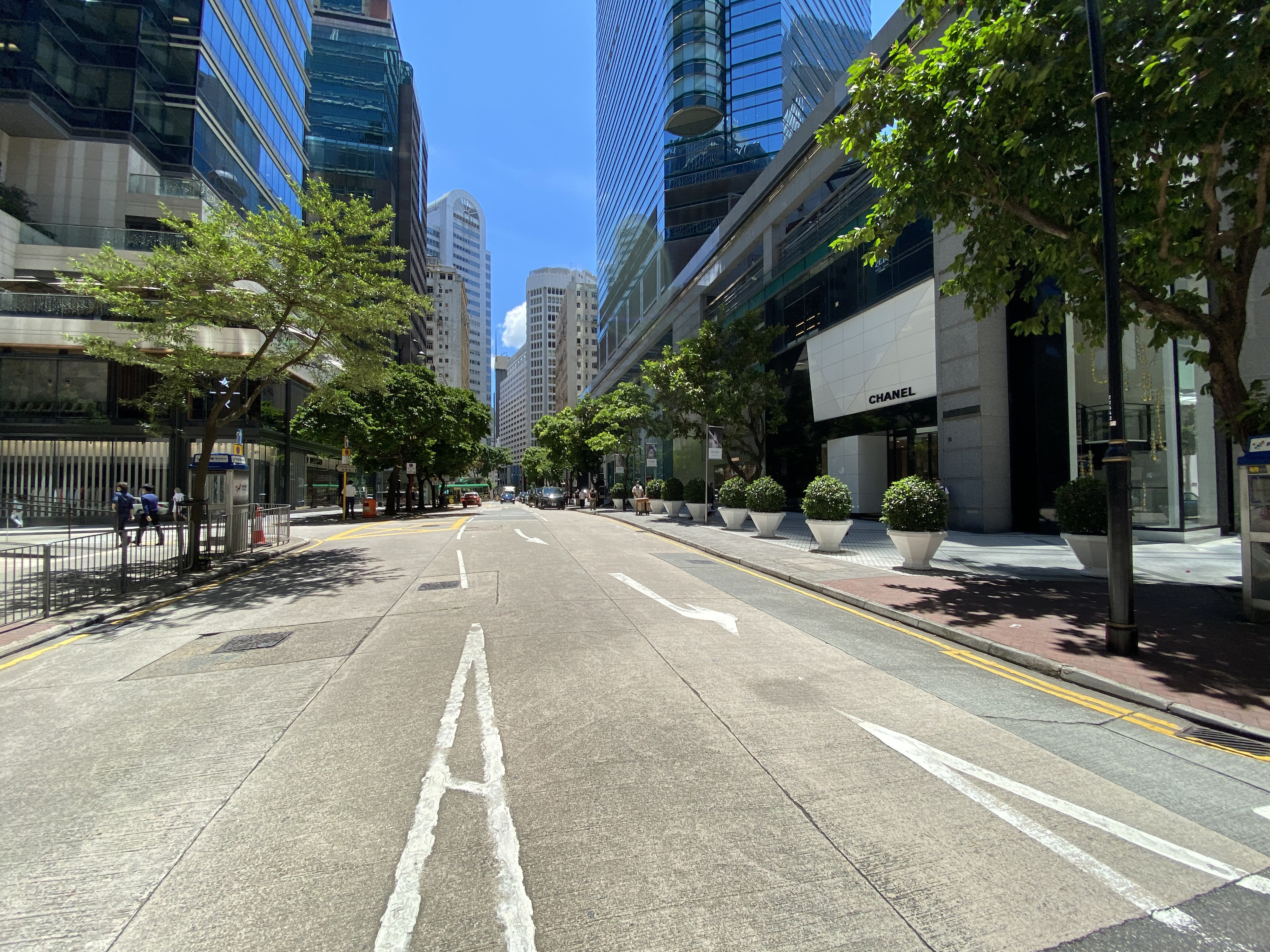 Hysan Avenue